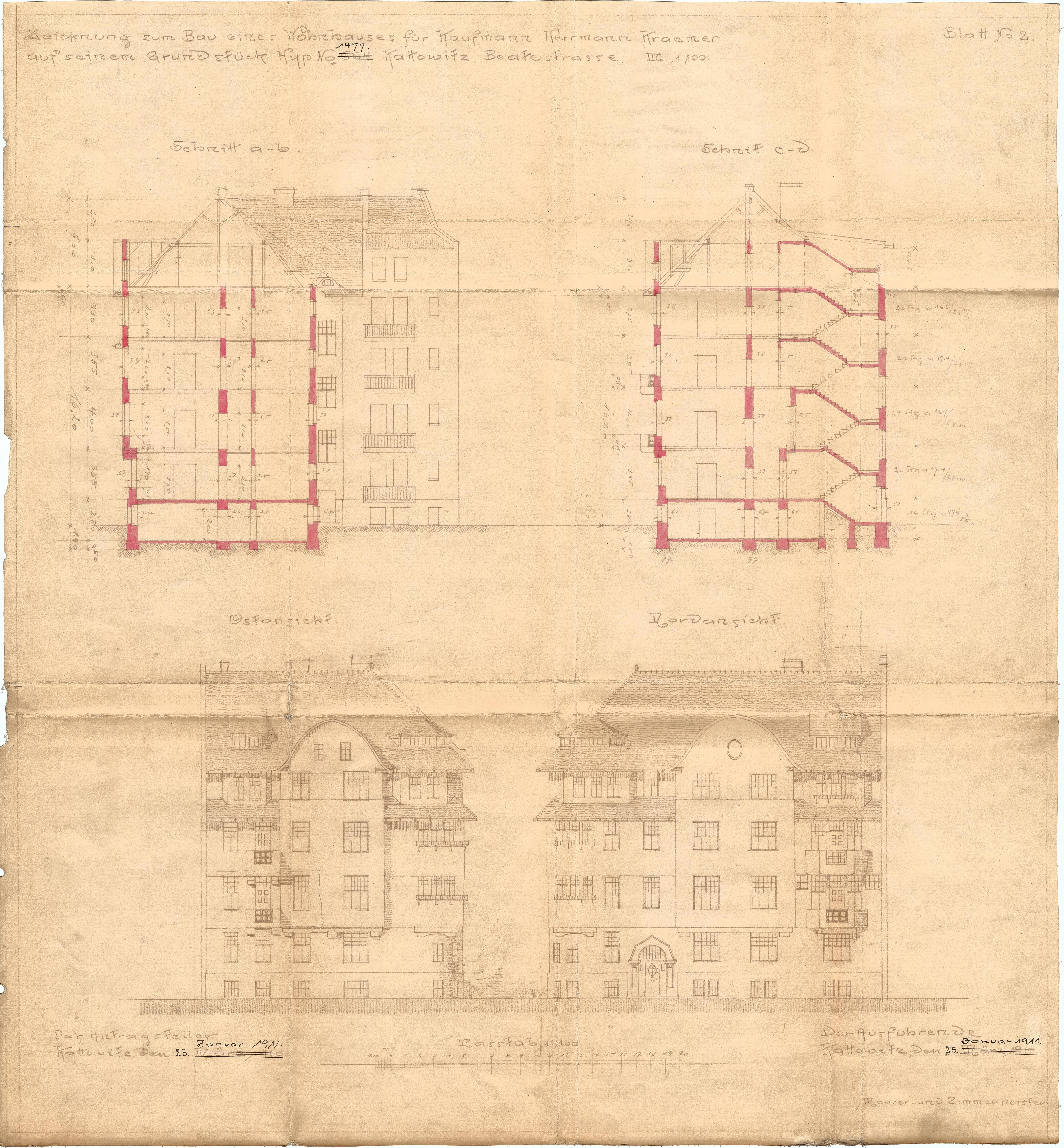 Pierwszy projekt istniejącego budynku z marca 1910 r., drugi (taki sam) projekt sygnowany jest z datą styczeń 1911 r.